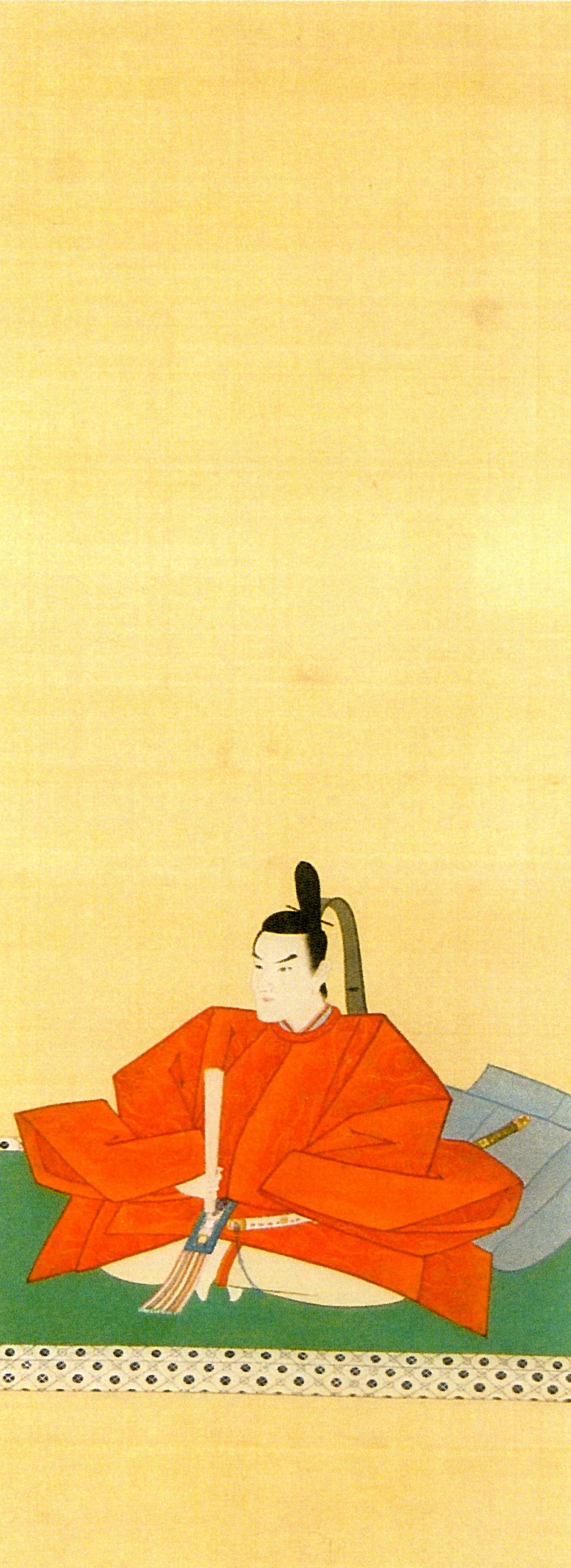 京極高美の肖像。